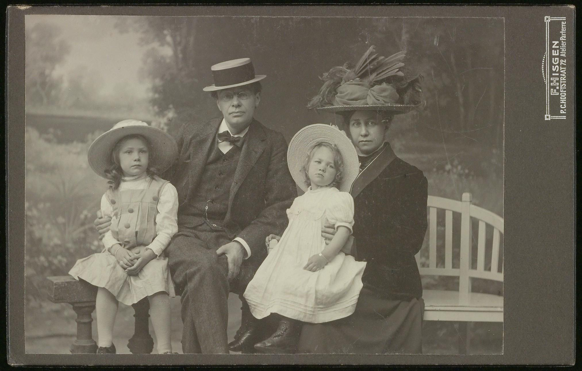 Beschrijving Groepsportret van Alphons Johannes Maria Diepenbrock met echtgenote Elisabeth Diepenbrock-de Jong van Beek en Donk en dochters Joanna en Dorothea Gefotografeerd door F. Hisgen Documenttype foto Vervaardiger Hisgen, F. Collectie Collectie Familie Alphons Diepenbrock Datering 1910 ca. Inventarissen Afbeeldingsbestand ANWO00010000001